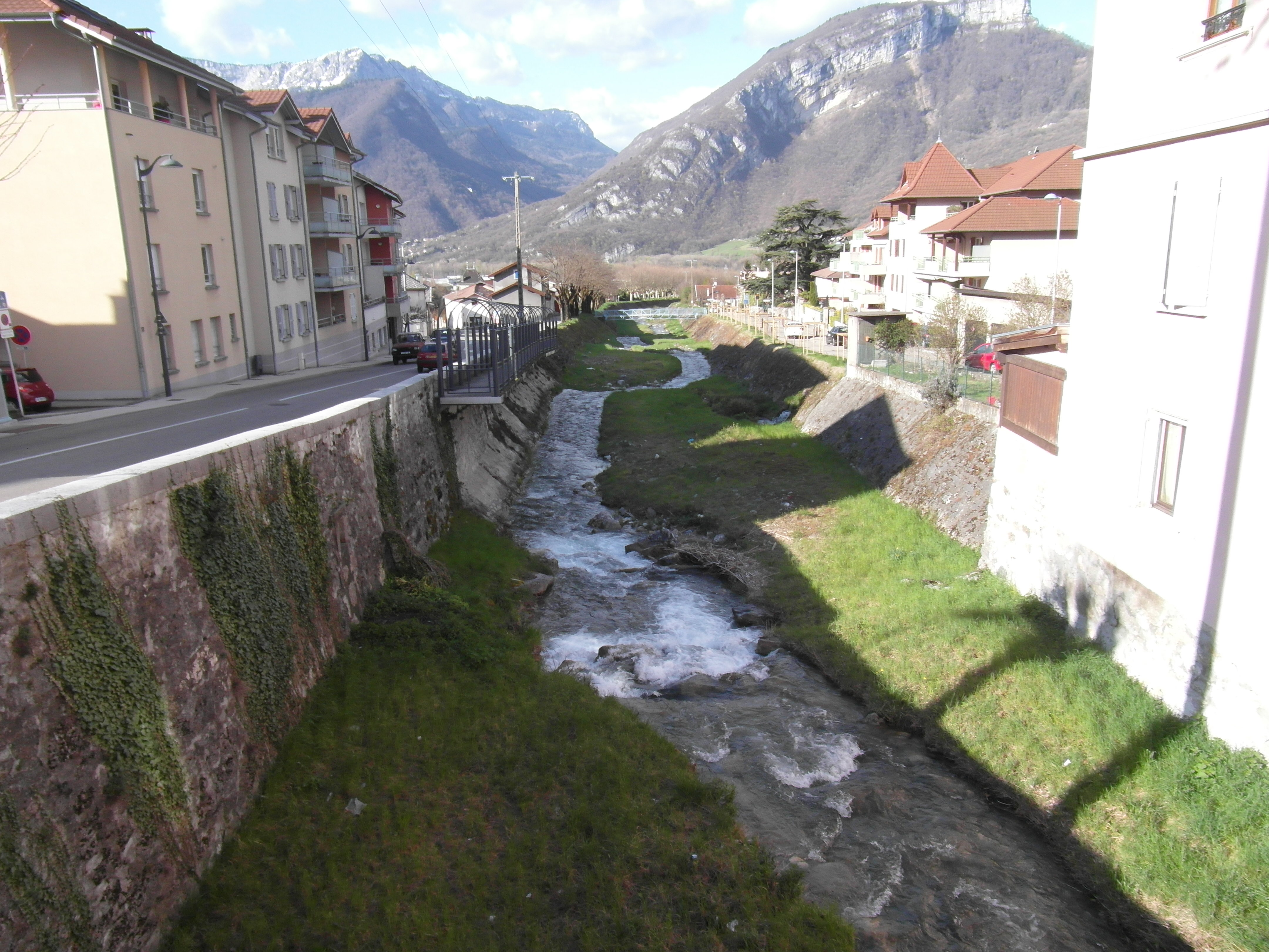 La Roize à Voreppe en avril 2018